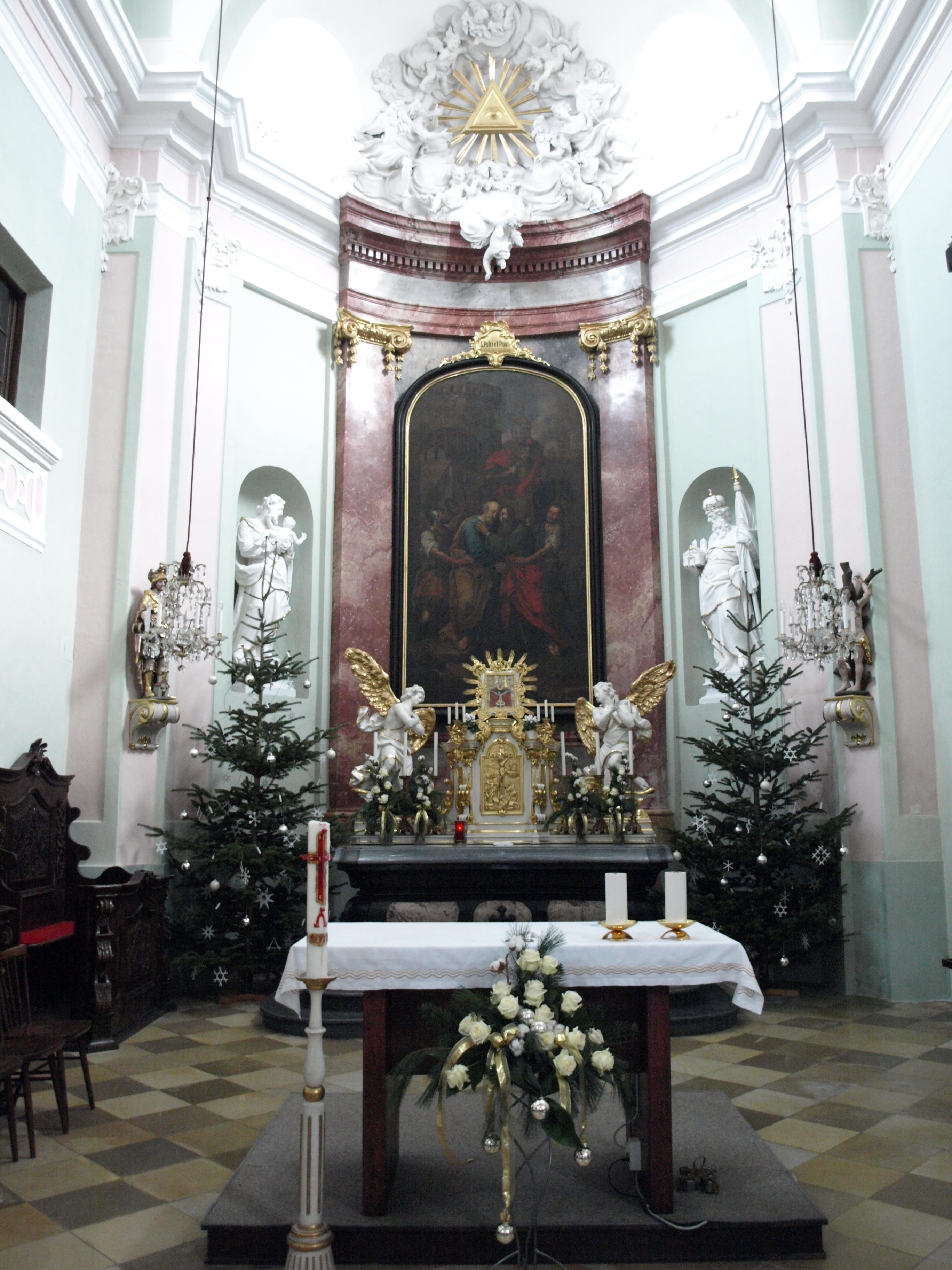 Kath. Pfarrkirche hll. Petrus und Paulus samt Friedhof